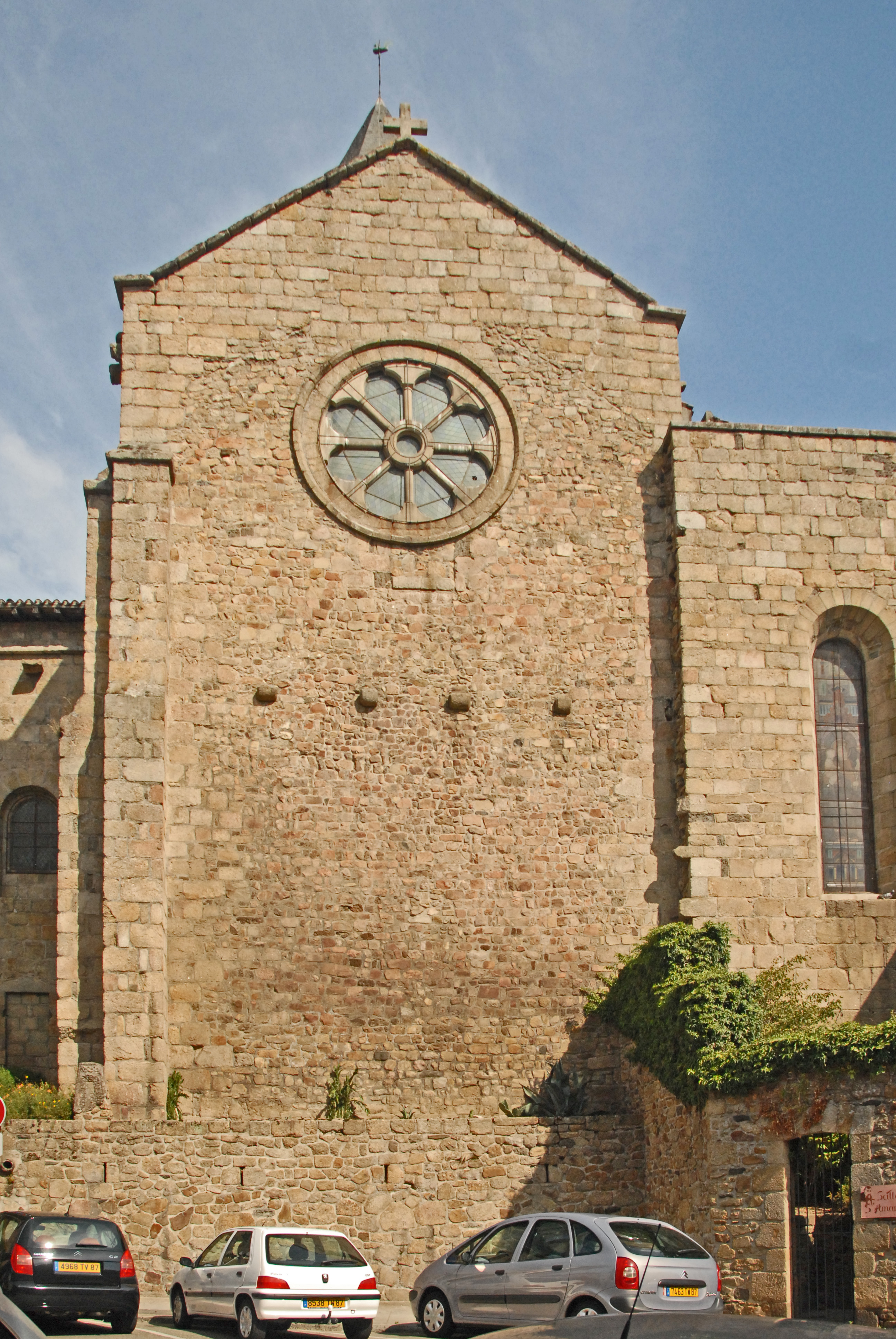 St-Junien, Giebelwand südl. Querhausarm